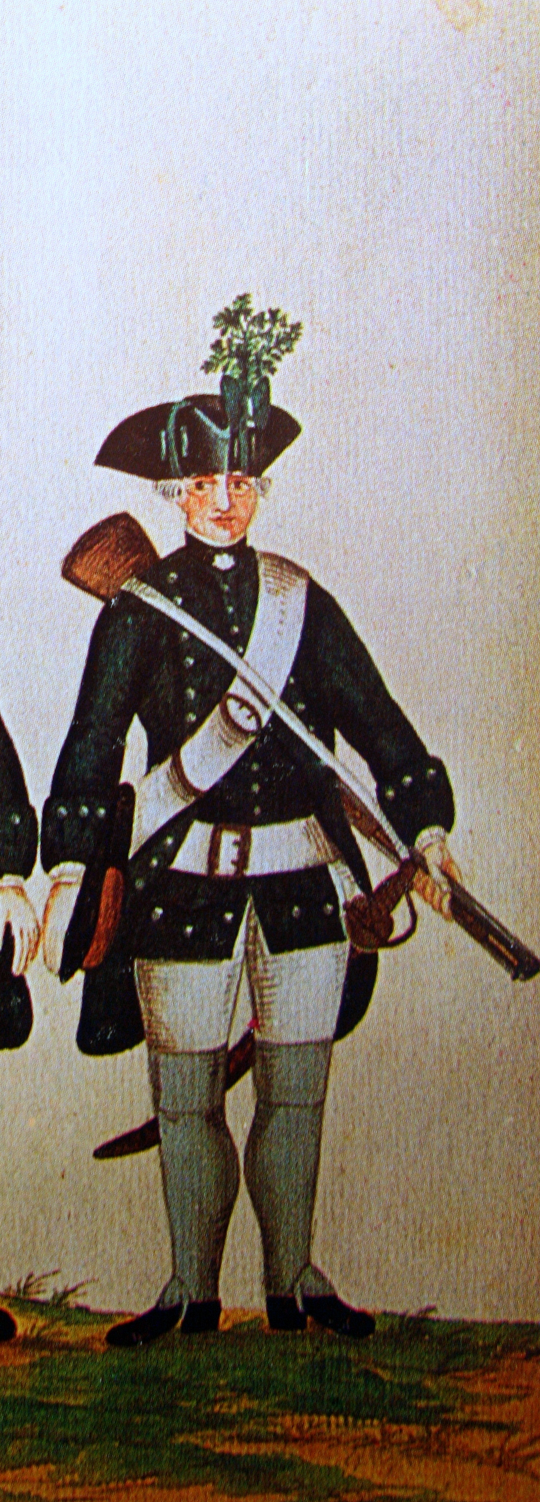 Freytag'sche Jäger Gmundener Prachtwerk der kurhannoverschen Armee während des Siebenjährigen Krieges.